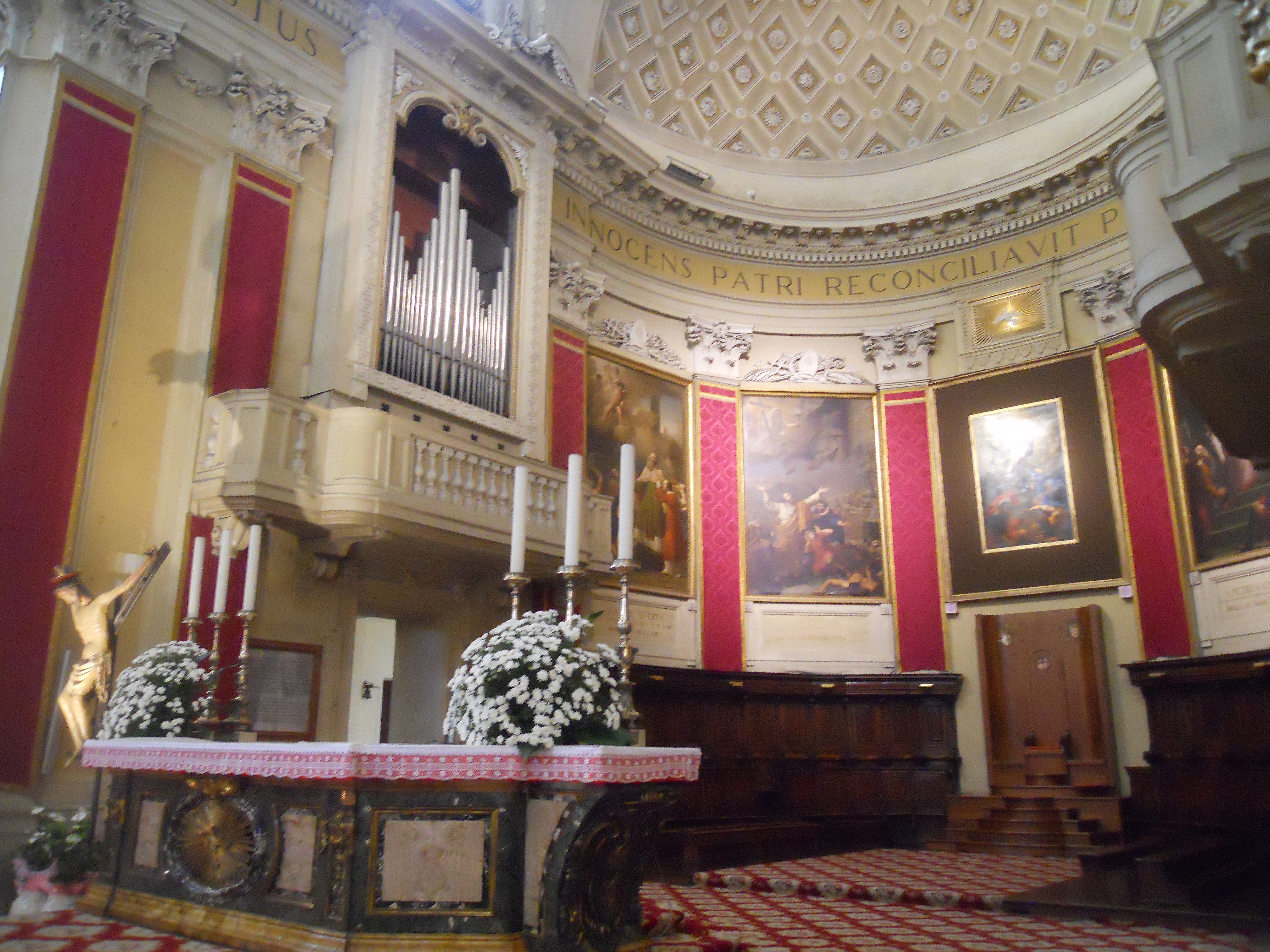 L'abside del duomo di Ravenna con l'altare maggiore e la cattedra.